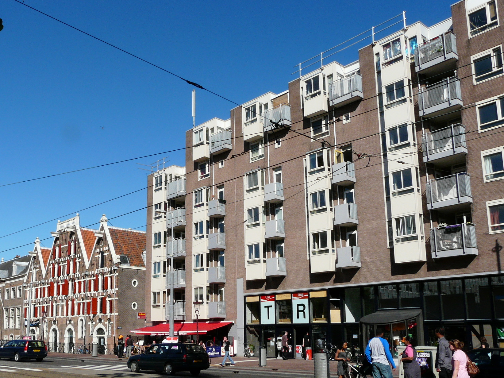 Bij de voorgevel an De Citadel loopt de grens van de Amsterdamse binnenstad dat de UNESCO nog beschouwt als werelderfgoed